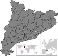 Localització de Sabadell. Location of Sabadell in Catalonia.